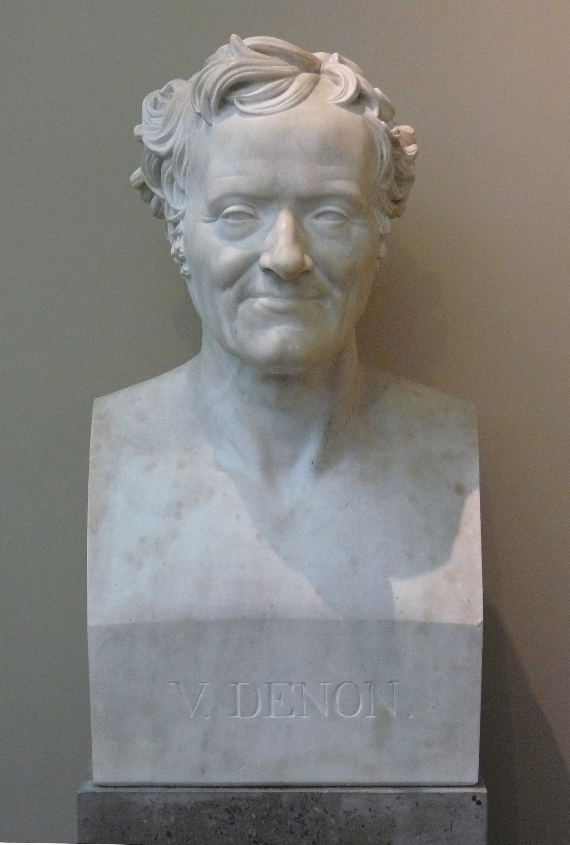 Buste en marbre de Dominique Vivant Denon par Joseph Charles Marin, commande du Louvre pour le Salon de 1827 - Musée du Louvre, Inv. n° CC 179 (Exposition "Histoire du Louvre) Salon, Louvre Palace, 1827 , cat.no. 1794